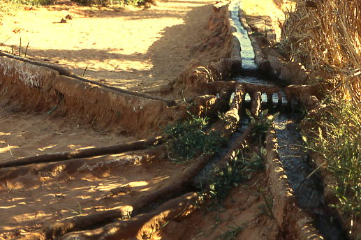 Distribution de l'eau dans la palmeraie de Timimoun (Algérie)